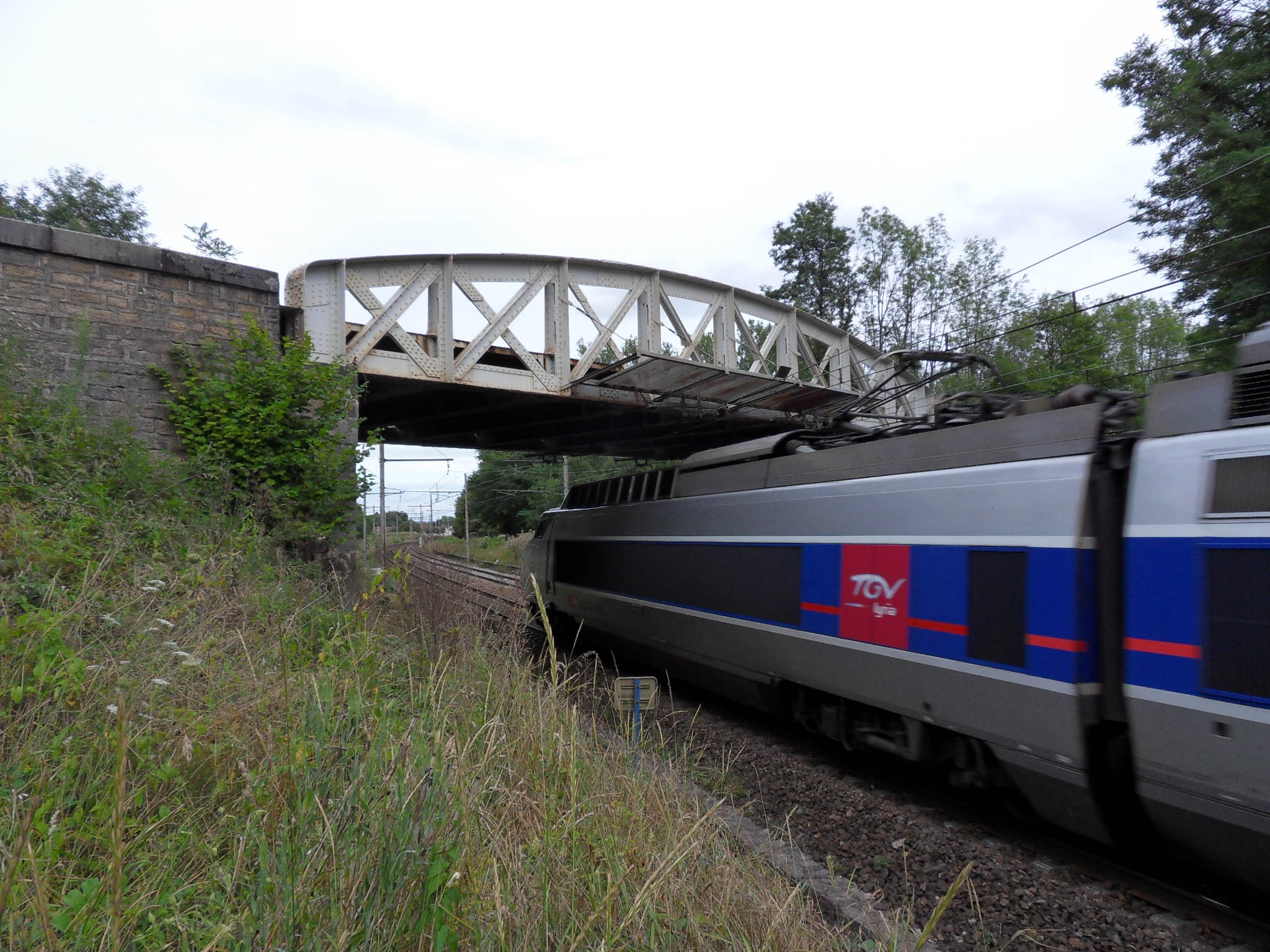 Gare de Villers-les-Pots. Pont-rail sur l'ancienne Ligne Gray - Saint-Jean-de-Losne. Un TGV Lyria se dirige vers Dijon